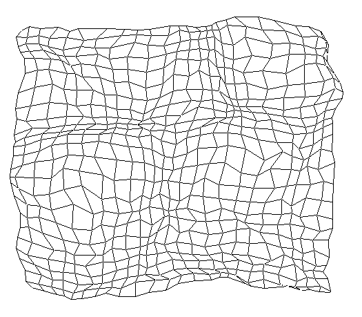 Som - 10000 Trainingsschritte